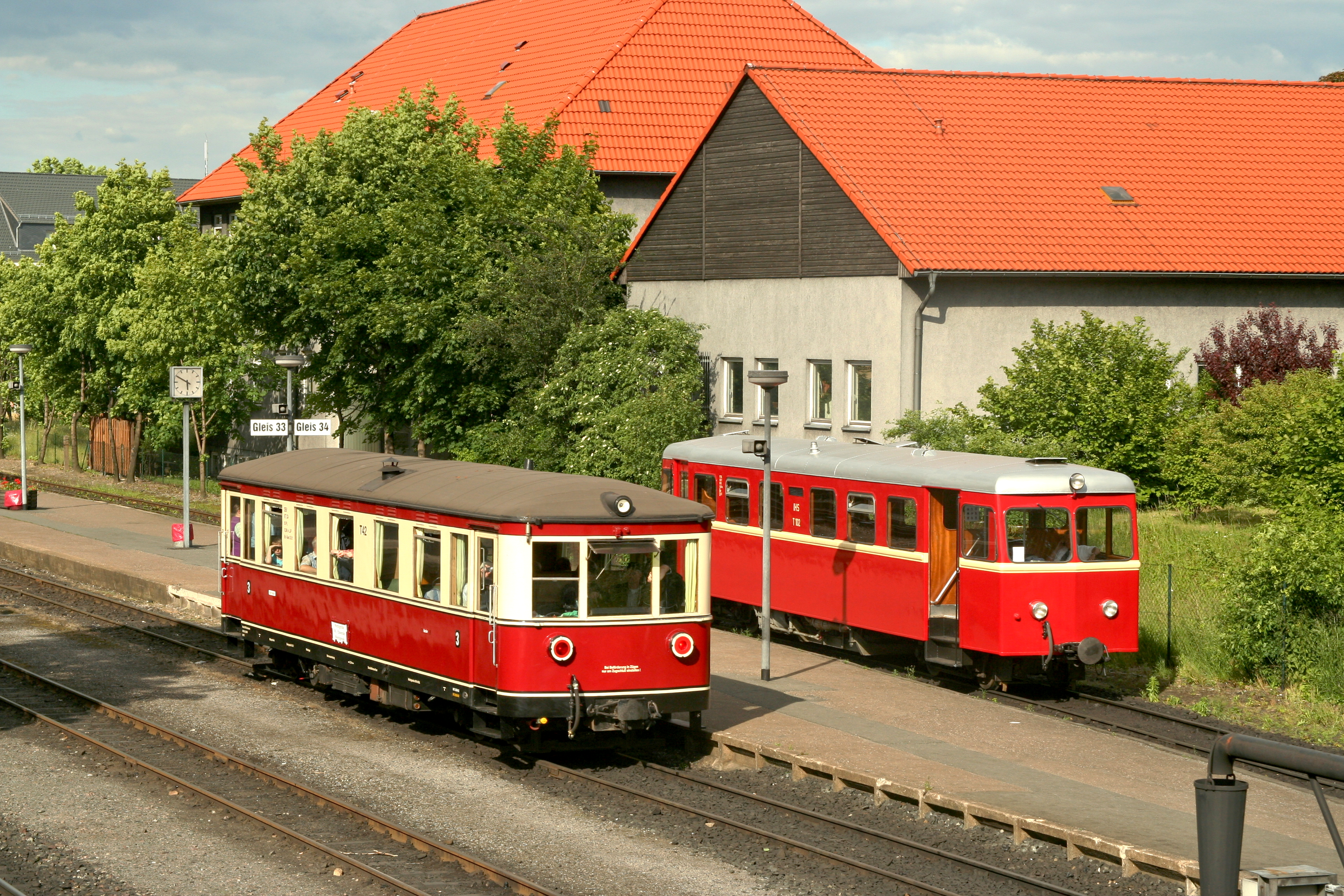 Bahnhof Wernigerode der HSB mit Gasttriebwagen T 42 des DEV und T 102 der IHS anläßlich des Jubiläums 125 Jahre Schmalspurbahnen im Harz am 09.Juni 2012